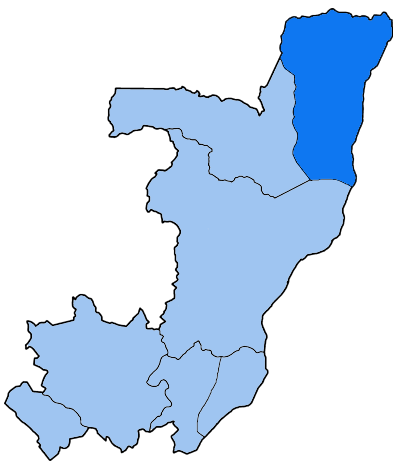 Mappa della diocesi cattolica di Impfondo, nella Repubblica del Congo.